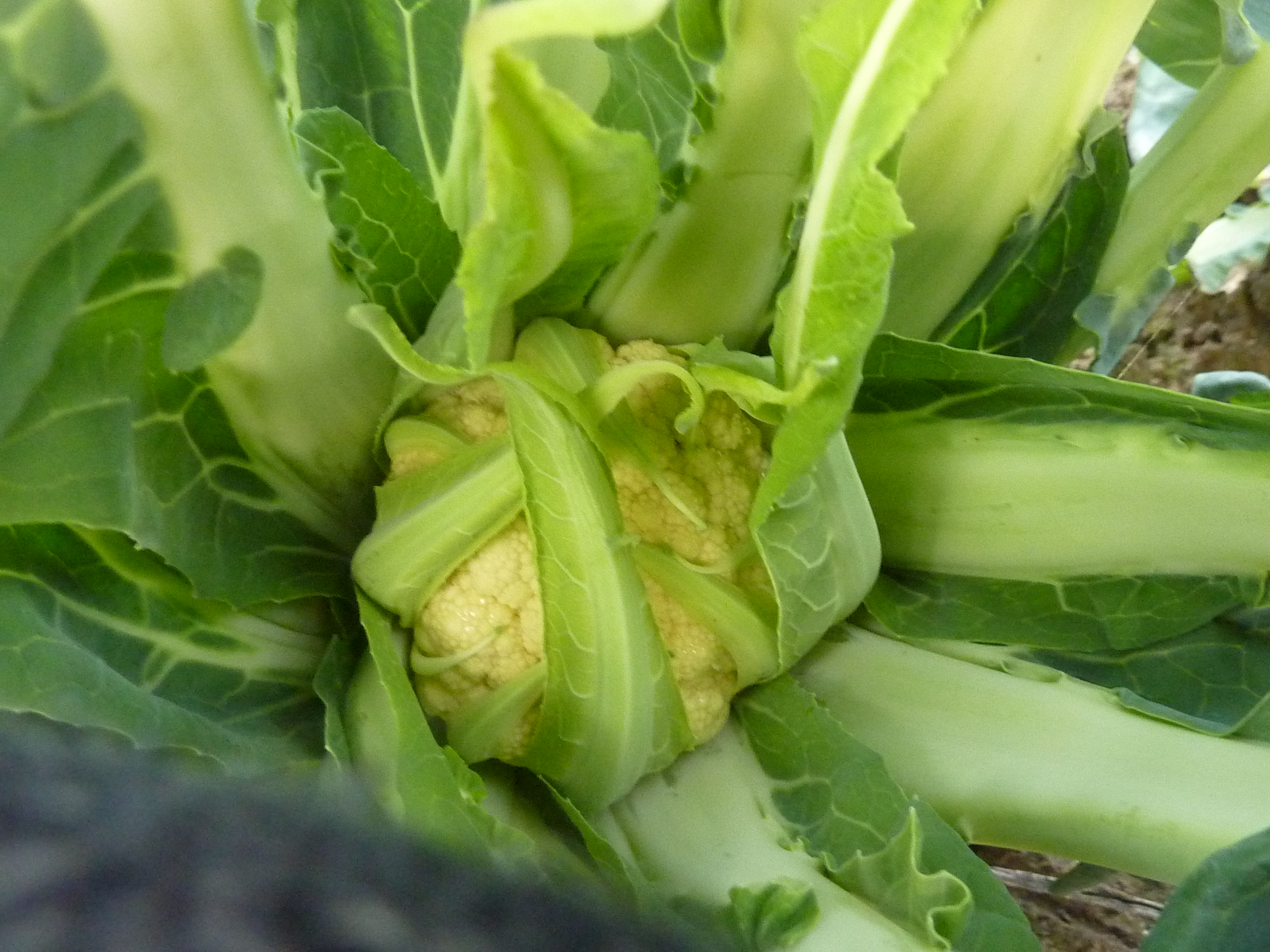 Il Broccolo di Torbole, nome scientifico Brassica oleracea botrytis varietà cymosa.